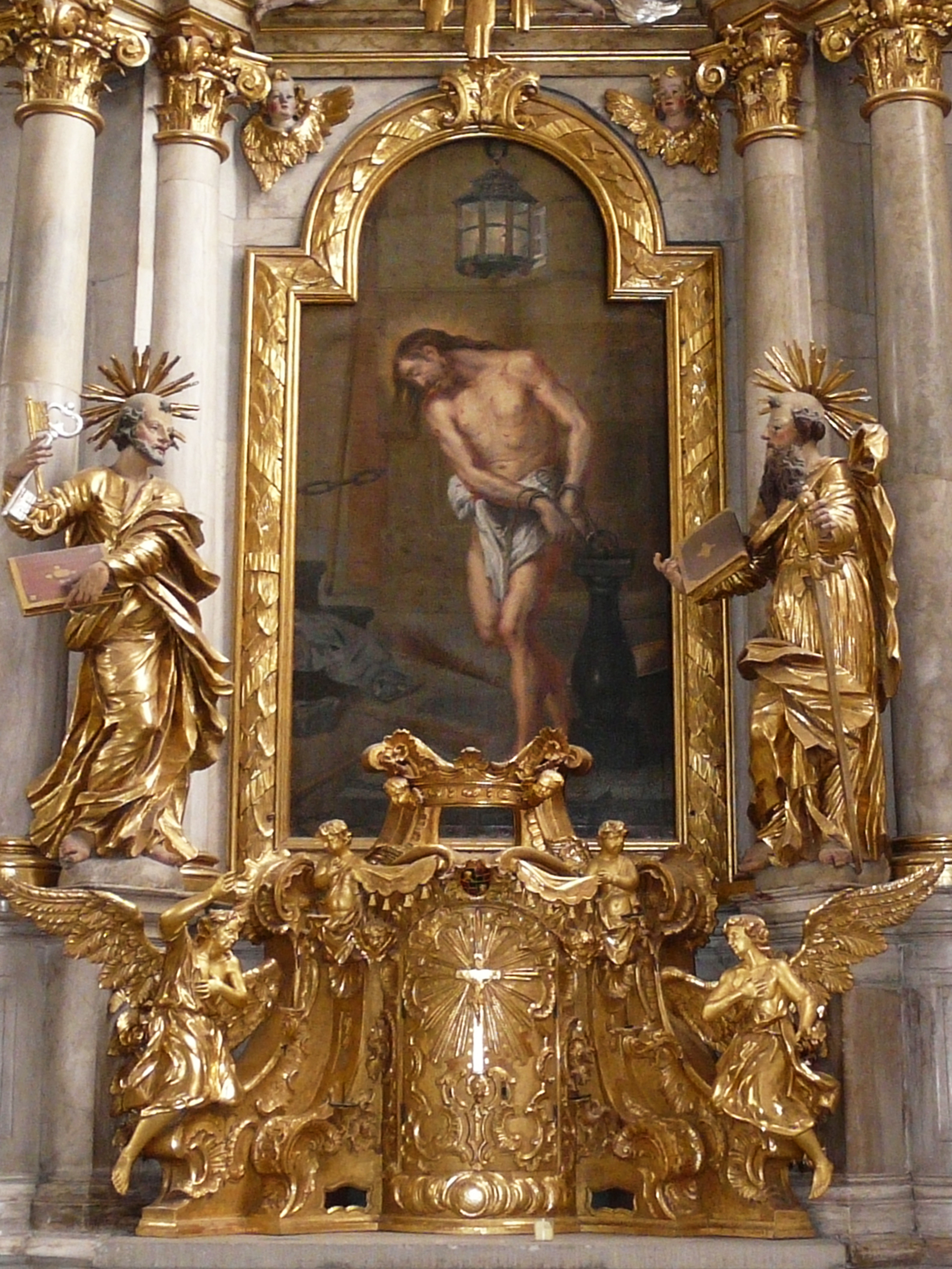 Фрагмент алтаря Петра и Павла